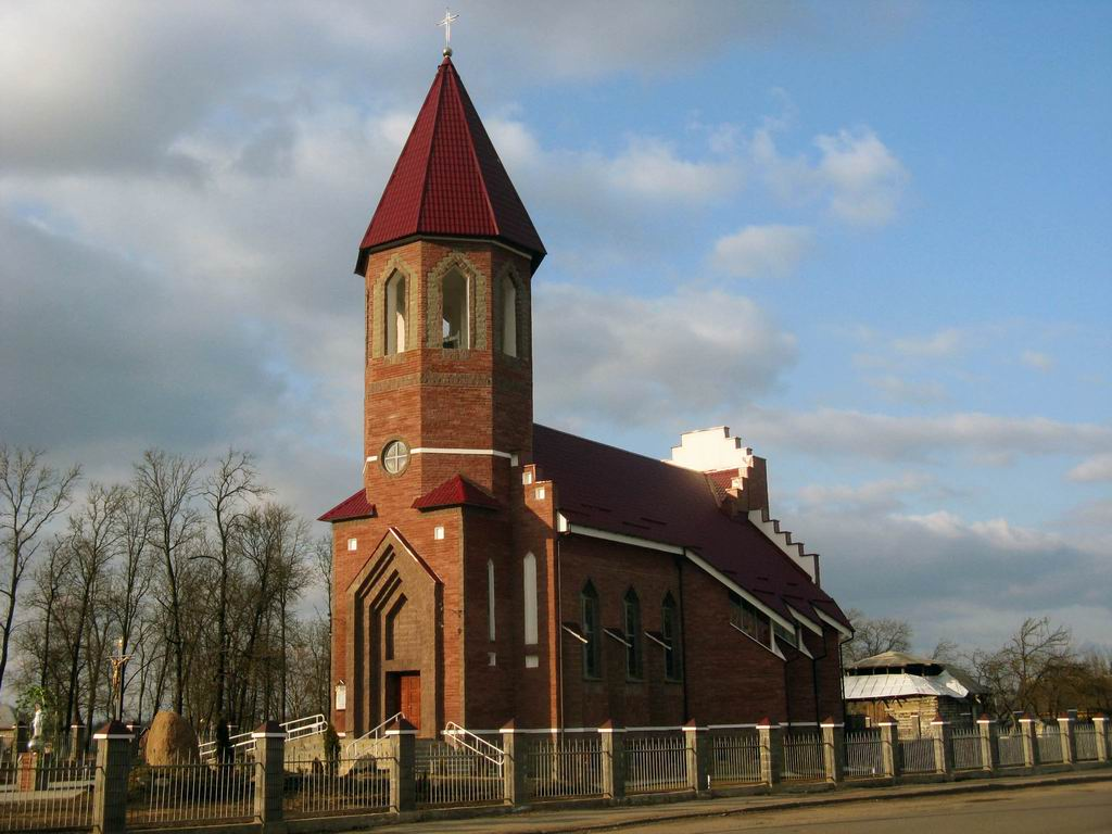 Беларуская (тарашкевіца): Клецак